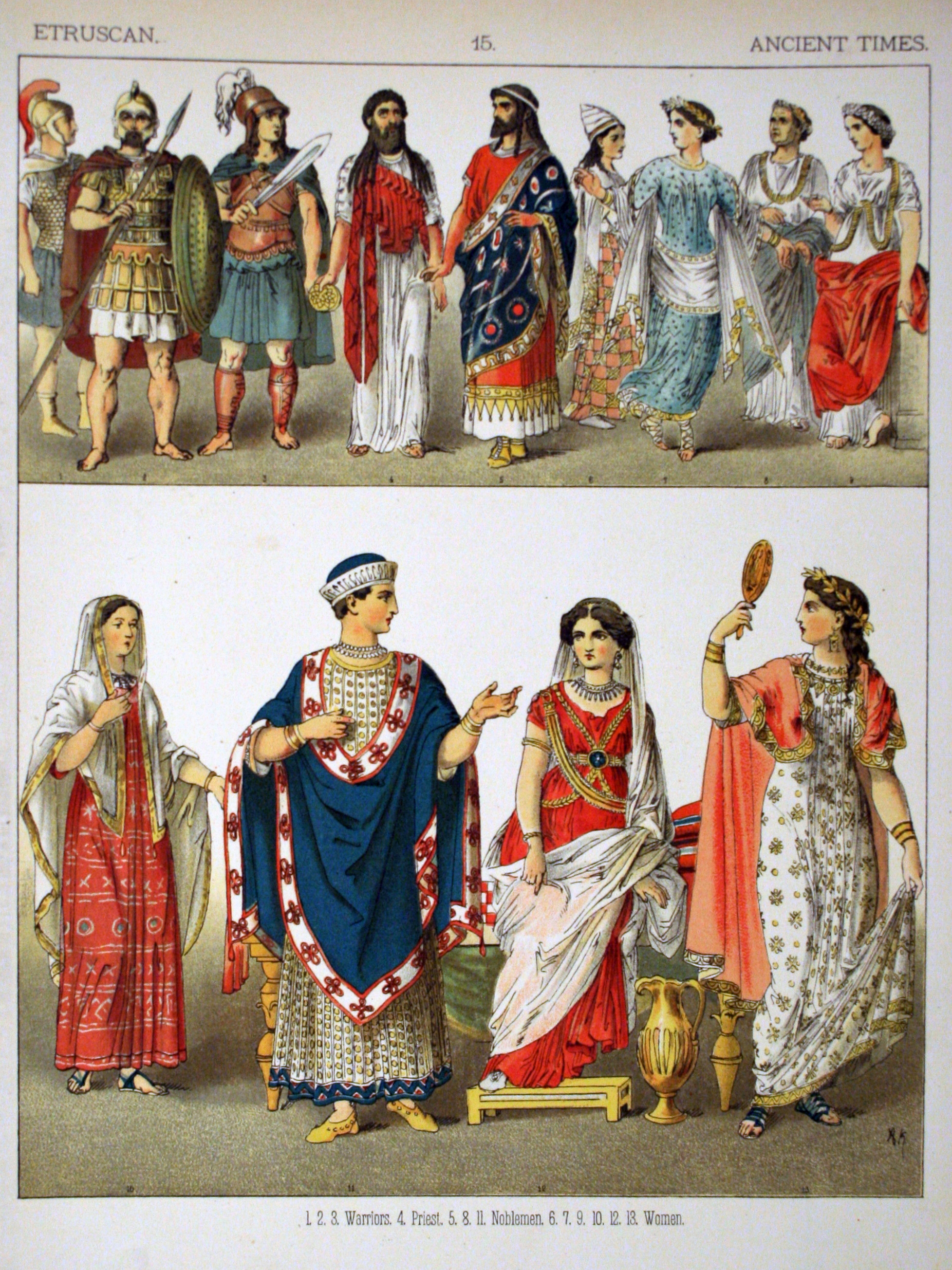 Ancient Times, Etruscan